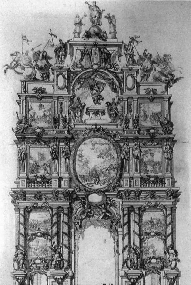 Arco de triunfo para la llegada de María Luisa de Orléans, Puerta del Sol, Madrid (1680). Estampa calcográfica atribuida a Matías de Torre según una composición original de Claudio Coello, Biblioteca Nacional, signatura E-70861